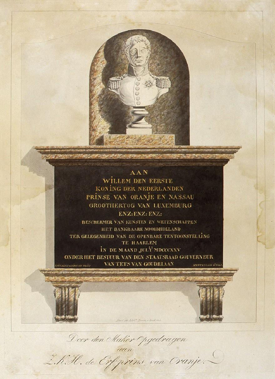 Borstbeeld in gips van Koning Willem I en zwart marmeren gedenkplaat ter herinnering aan de Tentoonstelling van Nationale Nijverheid, te Haarlem gehouden in 1825, door de Amsterdamse beeldhouwer Jean-François Sigault Cz. (1786-1833) aan de oostzijde van het Noordertransept. De gravure werd gemaakt door Alphonse Pierre Giraud.